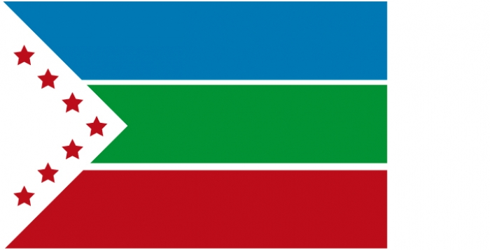 Bandera del cantón de Zarcero a partir del 2013.